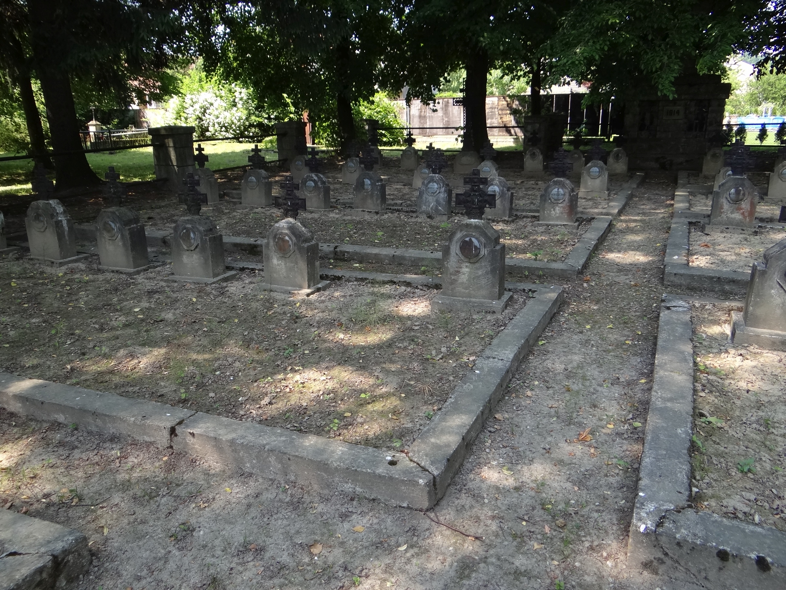 Cmentarz wojenny nr 161 Tuchów